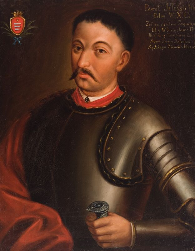 Беларуская (тарашкевіца): Партрэт Паўла Яленскага (Pavał Jalensk)